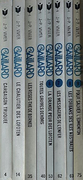 Quelques bouquins Marabout de Jo Gaillard .